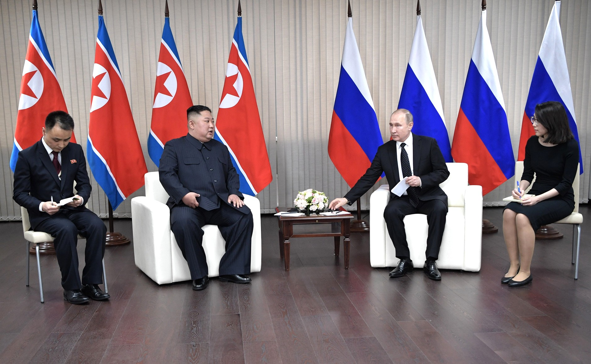 Переговоры Президента Российской Федерации Владимира Путина с Председателем Государственного совета Корейской Народно-Демократической Республики Ким Чен Ыном. Россия, Владивосток, остров Русский.